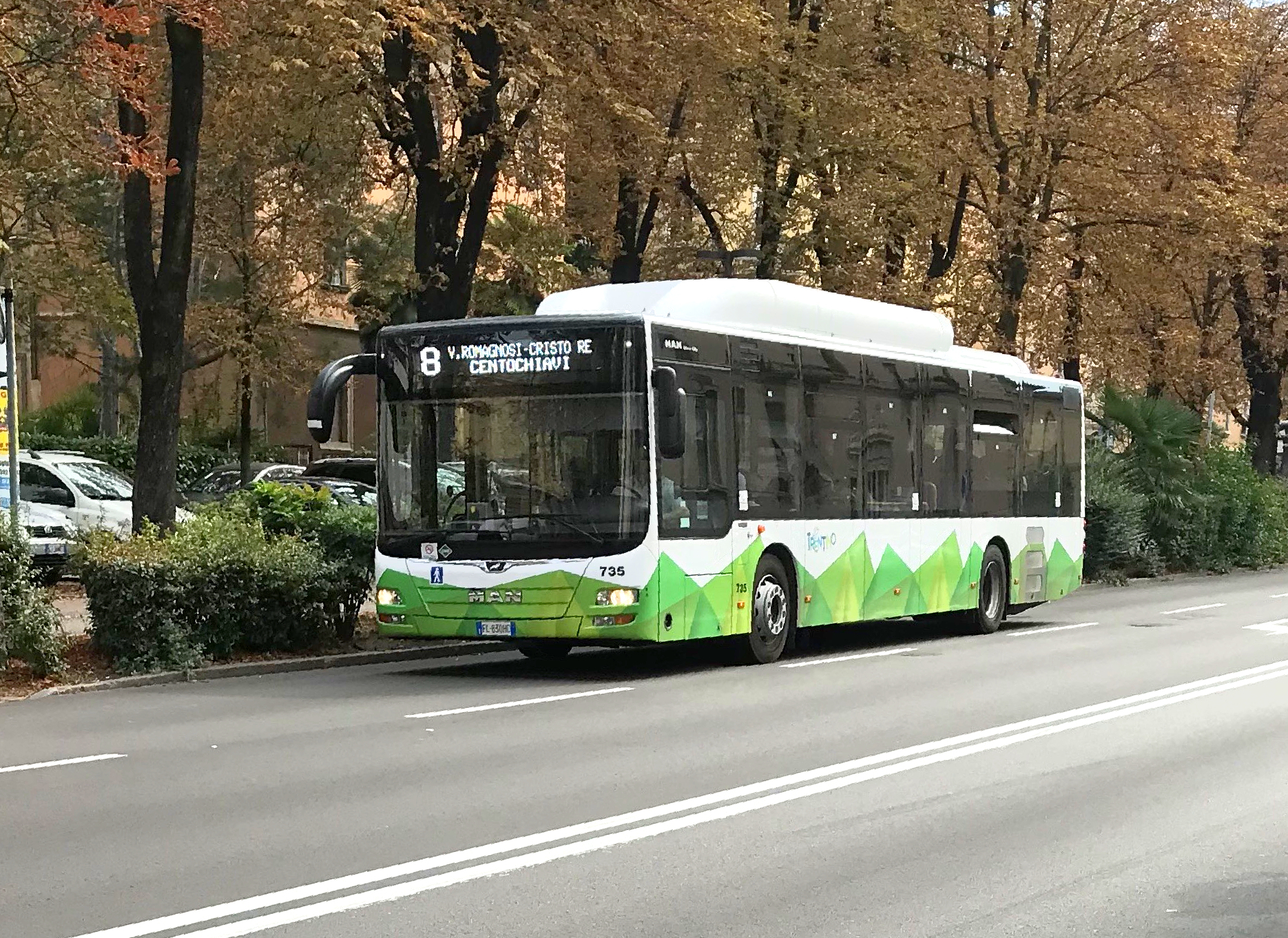 MAN Lion's City matr.735 (nuova livrea) di Trentino Trasporti (Trento) in servizio urbano sulla Linea 8 in Corso III Novembre.